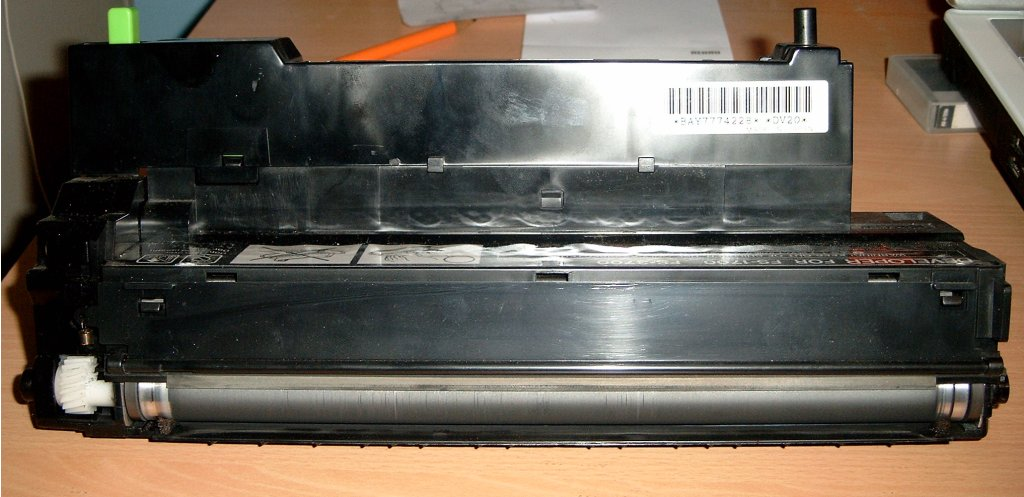 Permanententwicklereinheit der Firma Kyocera